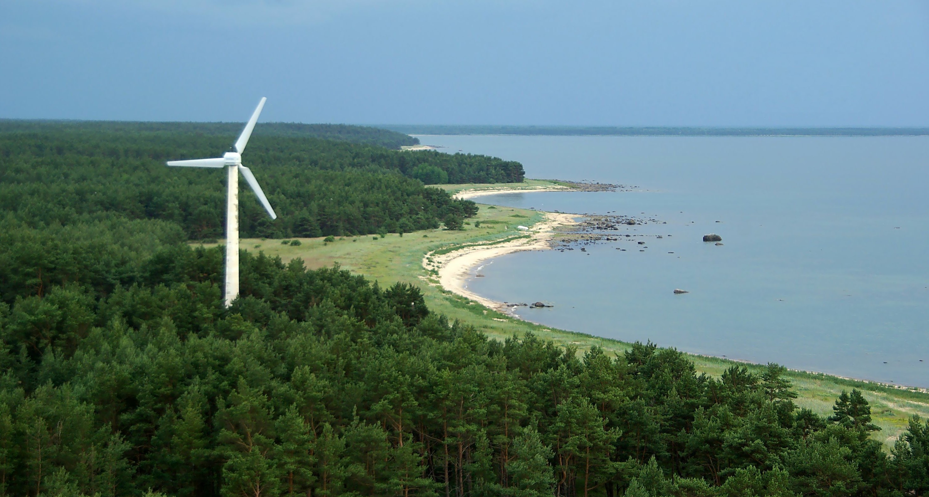 Tahkuna poolsaar on Hiiumaa põhjapoolseim poolsaar. Kuulub Hiiu maakonna Kõrgessaare valla ja kaguosas Pühalepa valla koosseisu. Poolsaarel asuvad Tahkuna nina, kivilabürint, tuletorn, Estonia huku mälestusmärk ja Lehtma sadam.